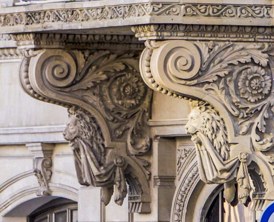 Seyid Mirbabayevin sarayında fasad detalı